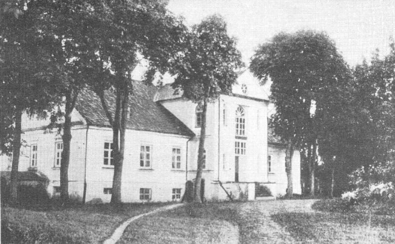 Burbiškio dvaro (Raseinių raj.) rūmai apie 1939 m.